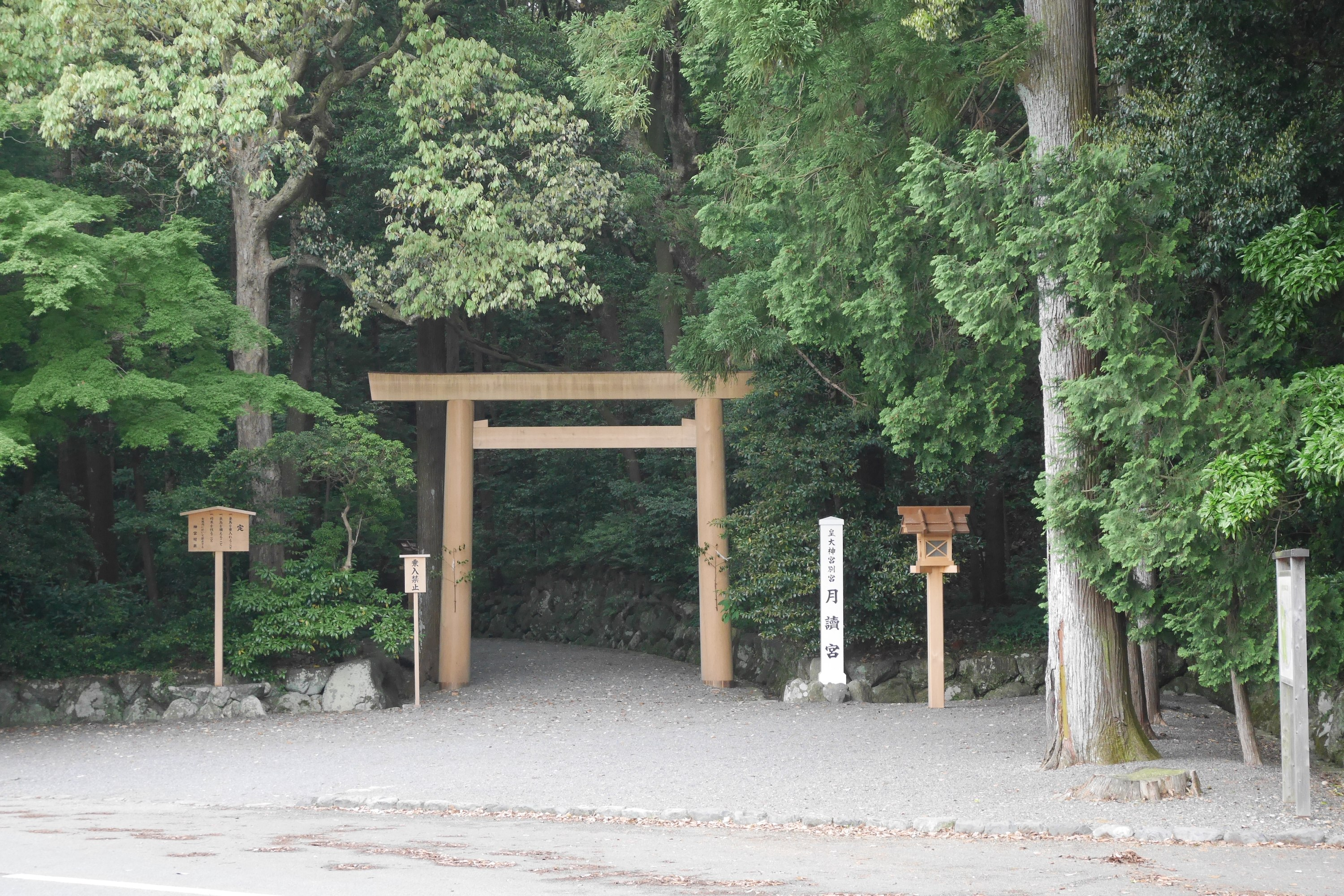 日本の三重県伊勢市にある皇大神宮別宮月讀宮の参道口の鳥居。